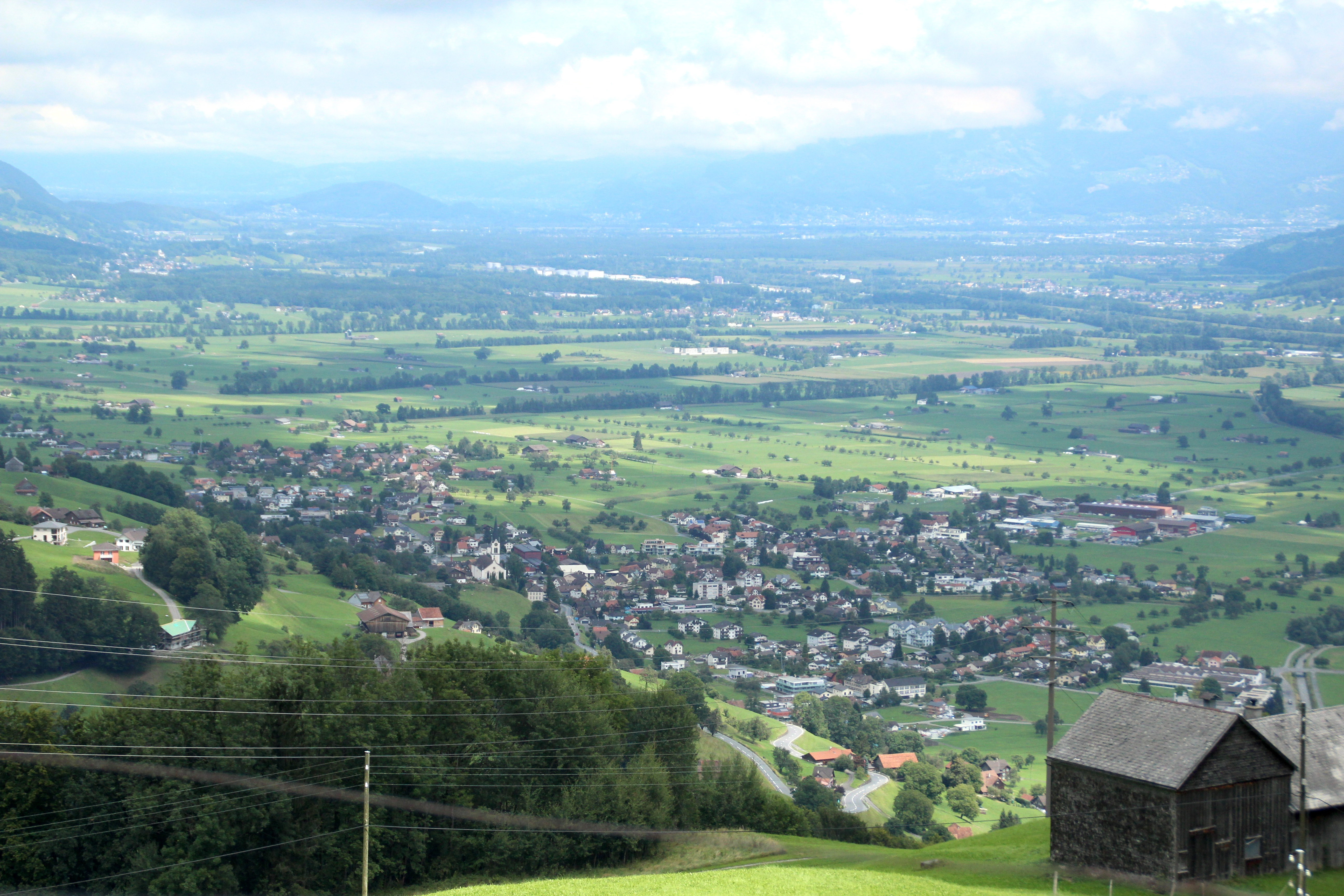 Gams